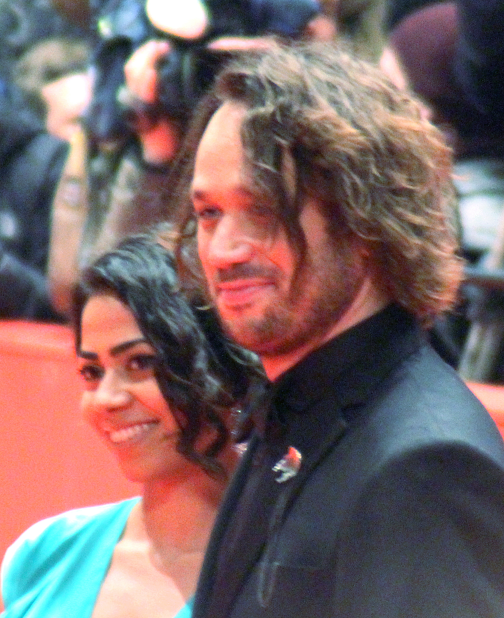 Elmer Bäck und Maya Zapata bei der Preisverleihung zur Berlinale 2015